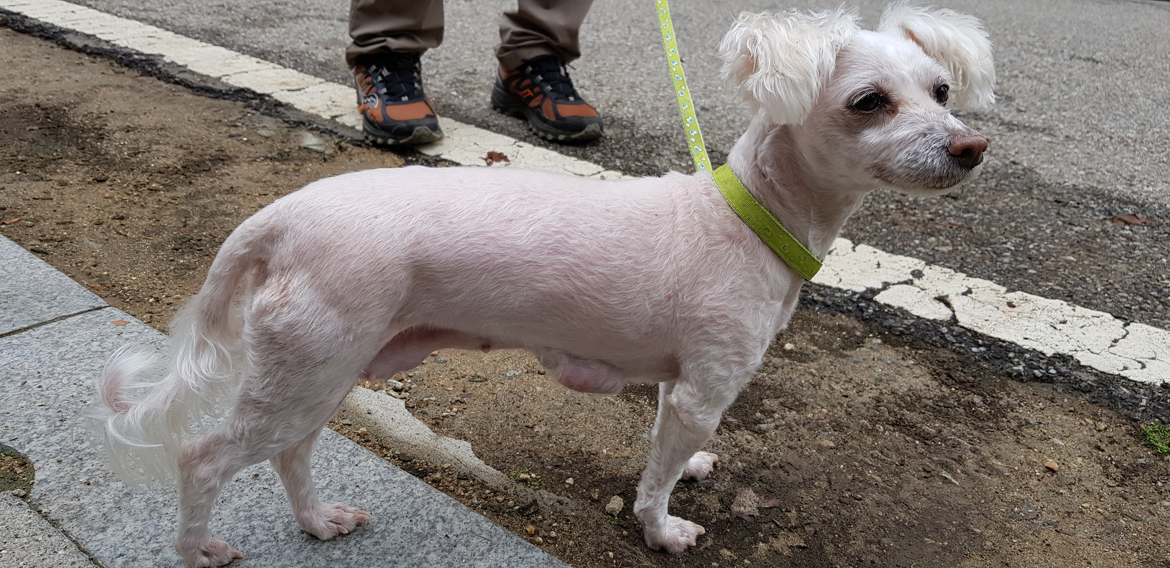 말티즈(15년생 몸에 혹이 있음, 청명호수마을)